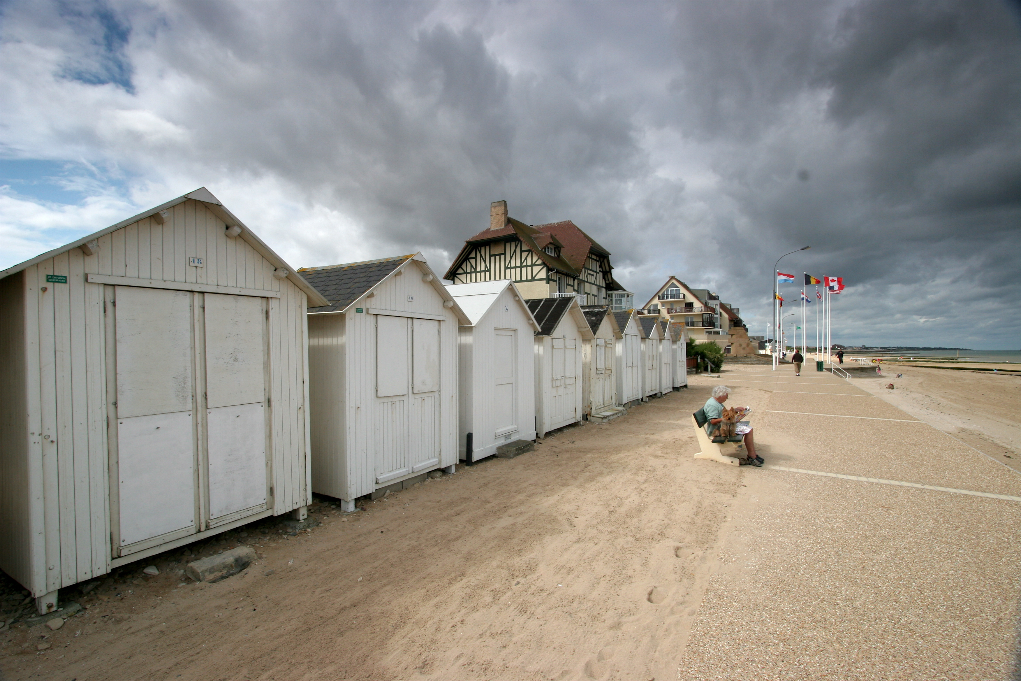 Cabines de plage à Bernières-sur-Mer (Calvados, Basse-Normandie, France).